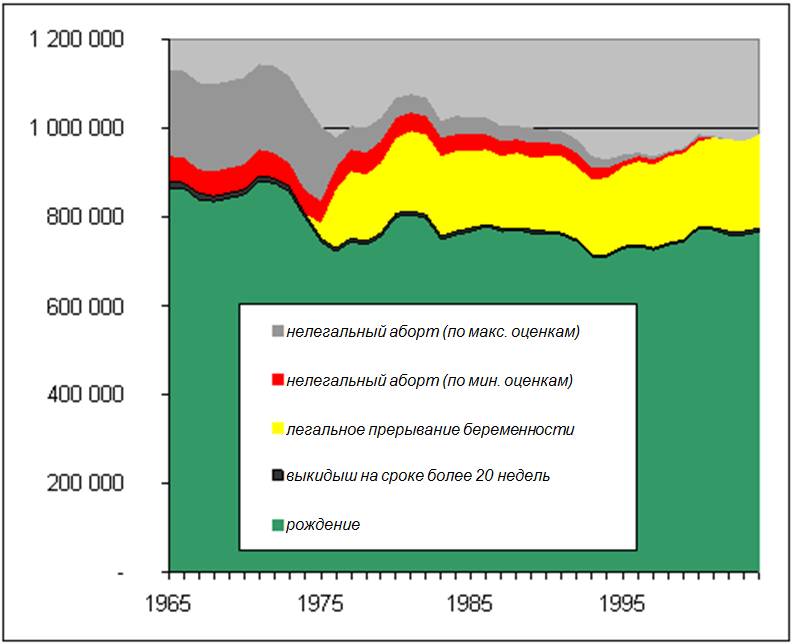 Superposition des statistiques de naissance et des statistiques d'avortement en France à partir de 1965 (données 2005)